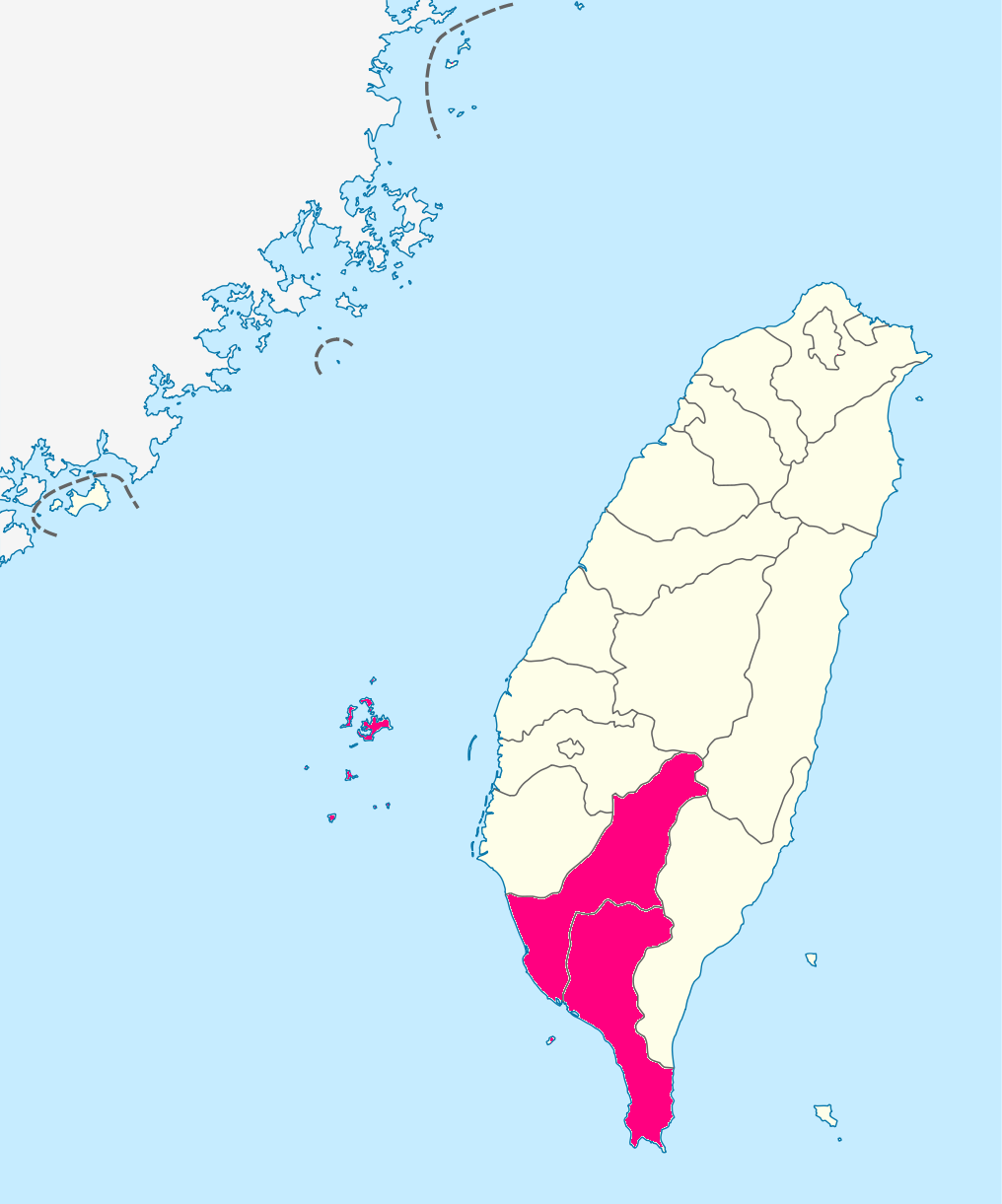 高屏澎地區地圖。